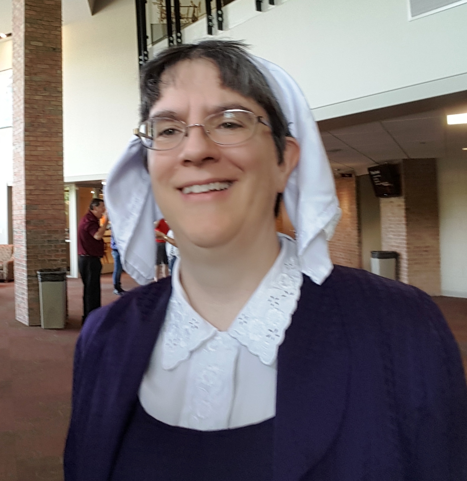 카린 마아크 (Karin Maag) 박사 세계칼빈학회 회장, 헨리미터 센터 소장(캘빈 칼리지)